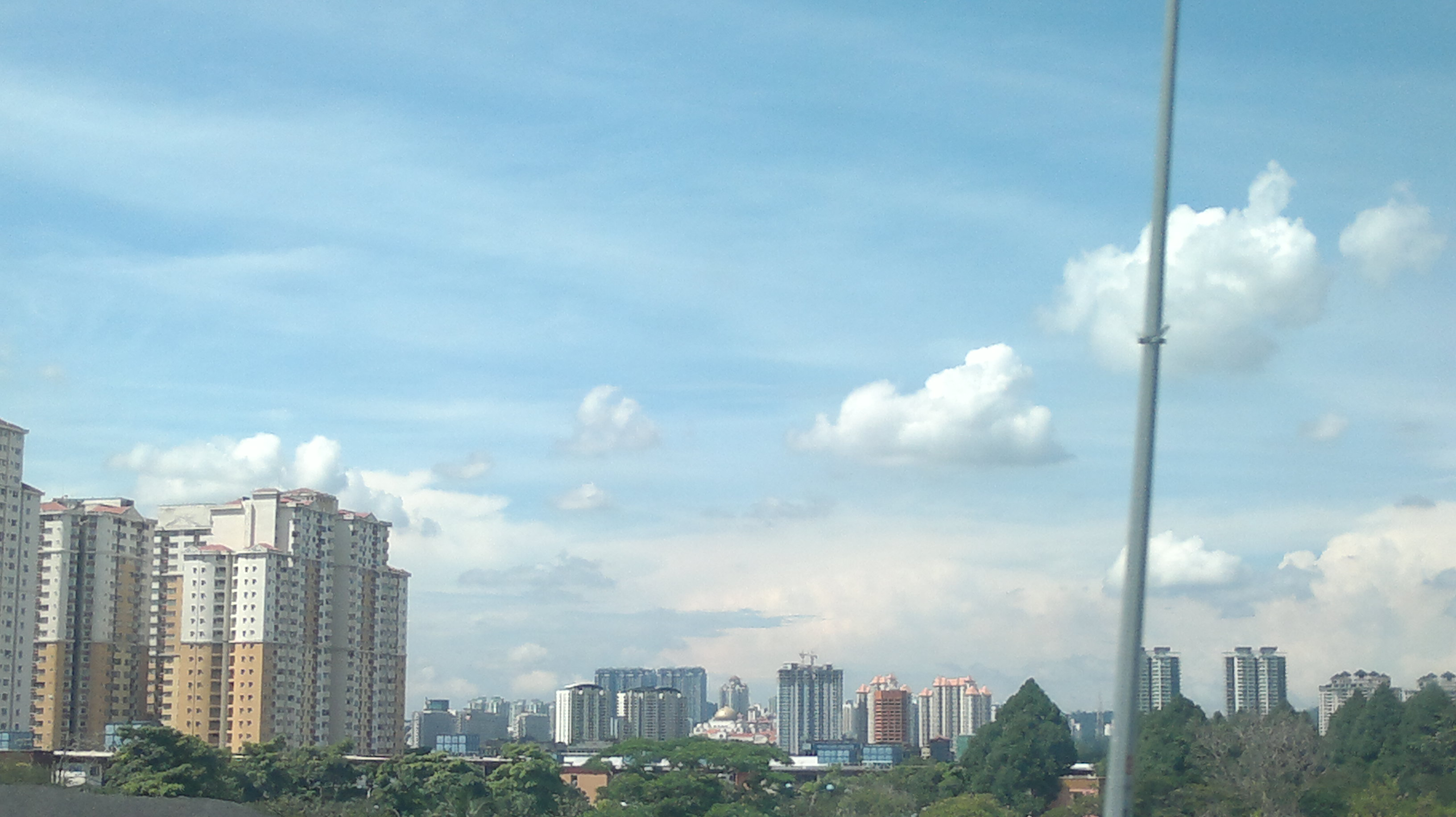 Setapak, Kuala Lumpur, Federal Territory of Kuala Lumpur, Malaysia